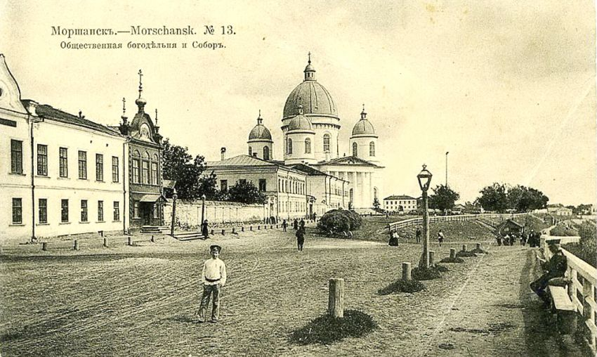 Троицкий собор в Моршанске до революции.